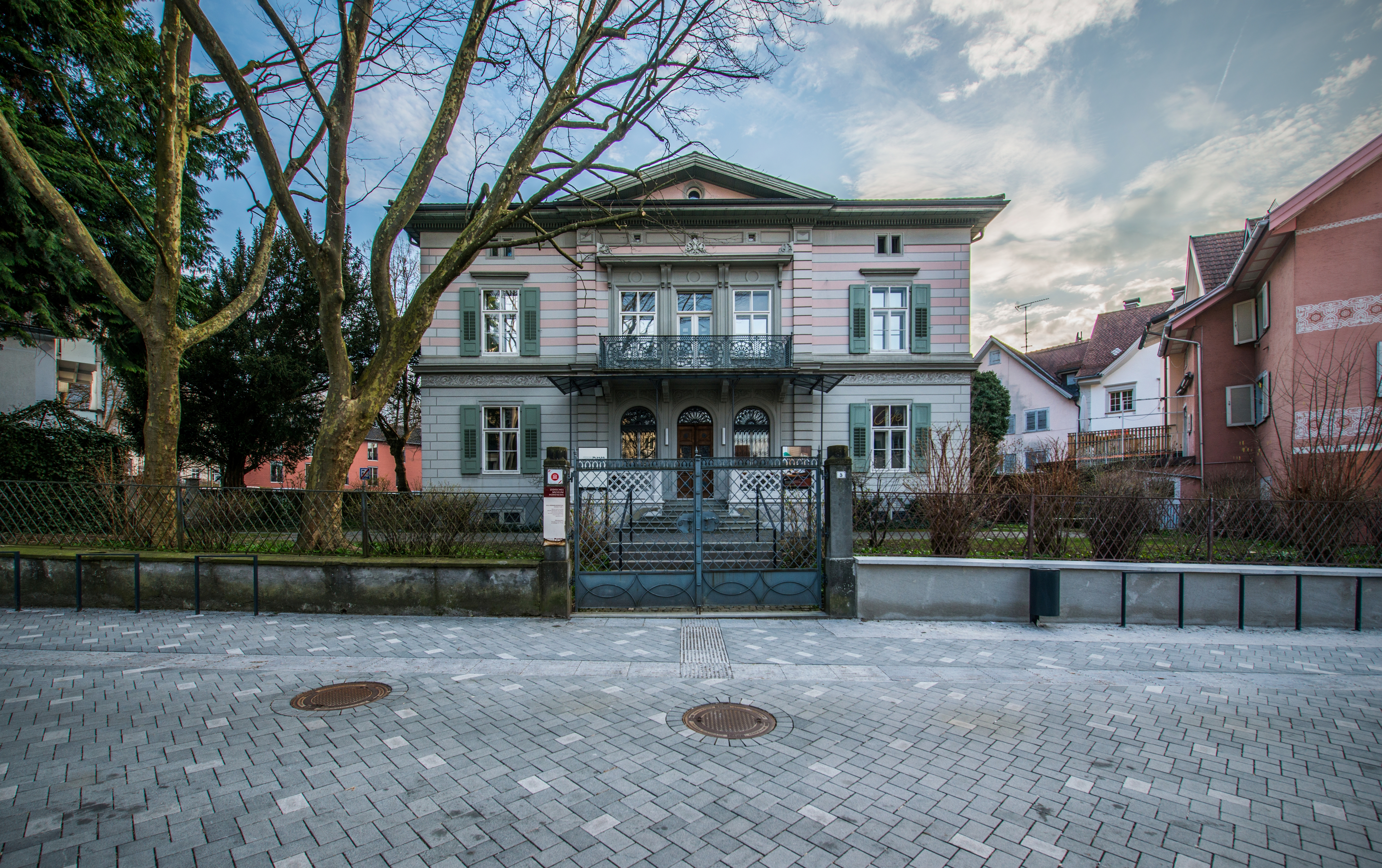 Jüdisches Museum Hohenems aus dem DEHIO Vorarlberg 1983: Schweizer-Straße Nr.5 in Hohenems; ("Burtschervilla"): Bemerkenswerte strenghistoristische Villa, erbaut um 1860-1870, kubischer Baukörper mit durch Dreieckgiebel bekröntem Mittelrisalit, stark akzentuierte Eingangspartie, originale Fassadenmalerei mit aufgemalter Nutung und Ornamentik.